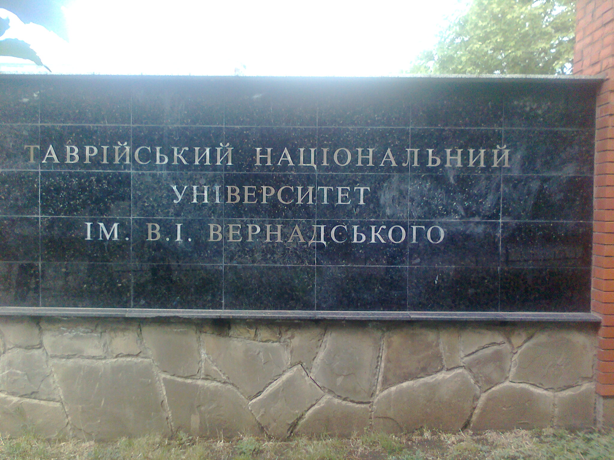 ТНУ им. В.И. Вернадского